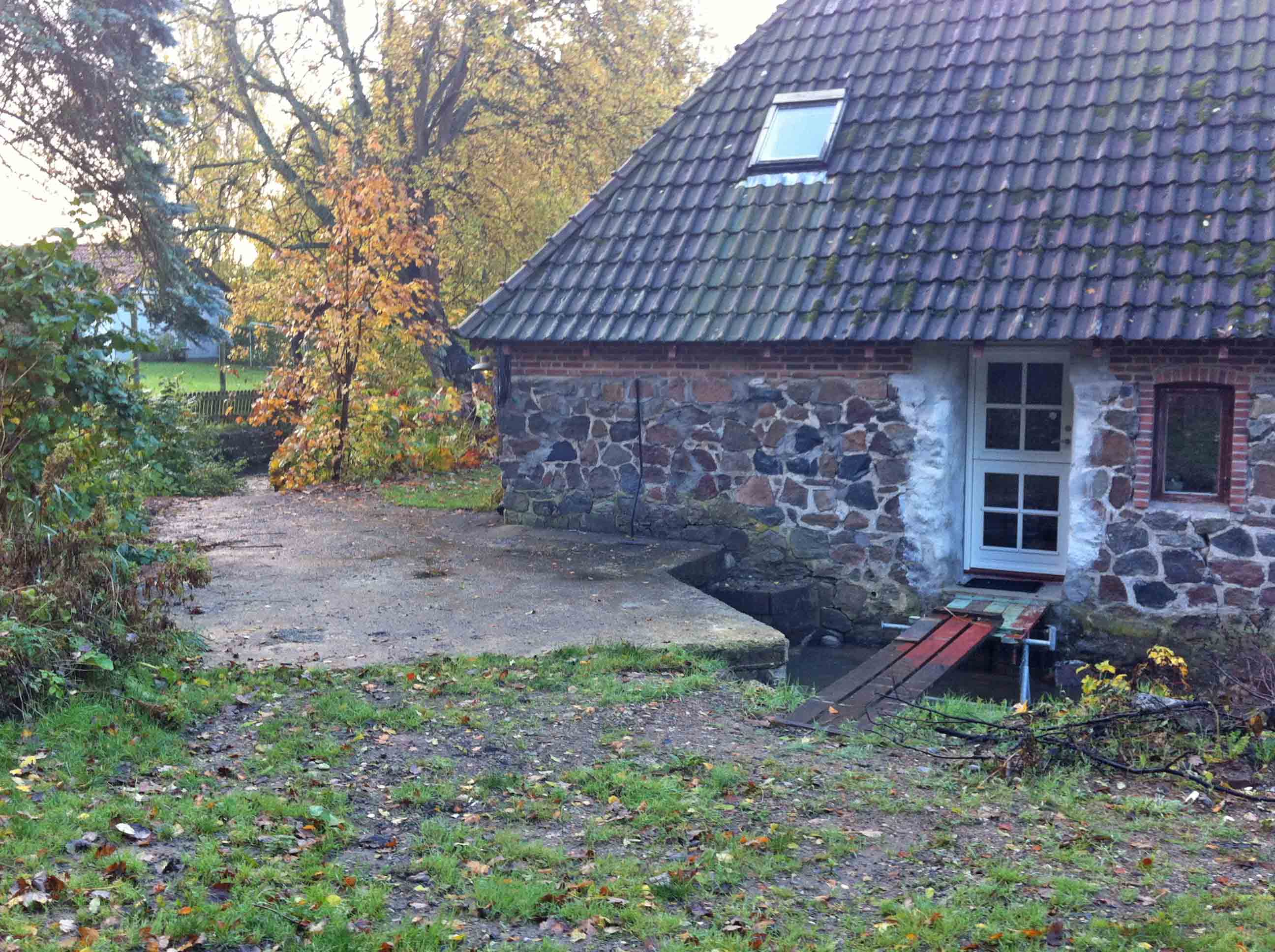 Rest af Haldrup Vandmølle